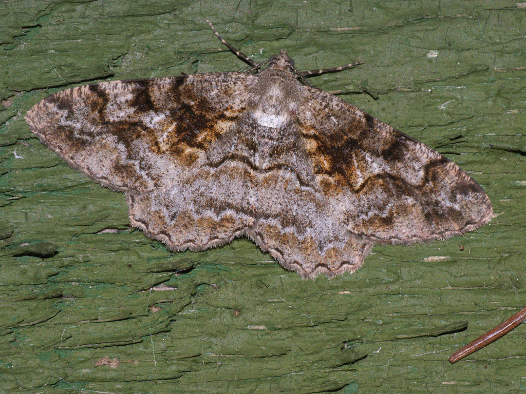 Exemplar found: Russia, Moscow Oblast, Odintsovsky District, near village Pestovo, 29.06.2009, by light МО, Одинцовский р-н, окрестности деревни Пестово, 29.06.2009, на свет